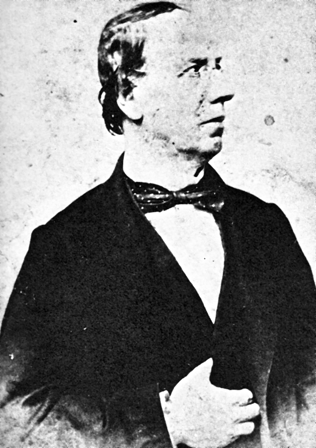 Juan Antonio Ribeyro, político y magistrado peruano del siglo XIX.